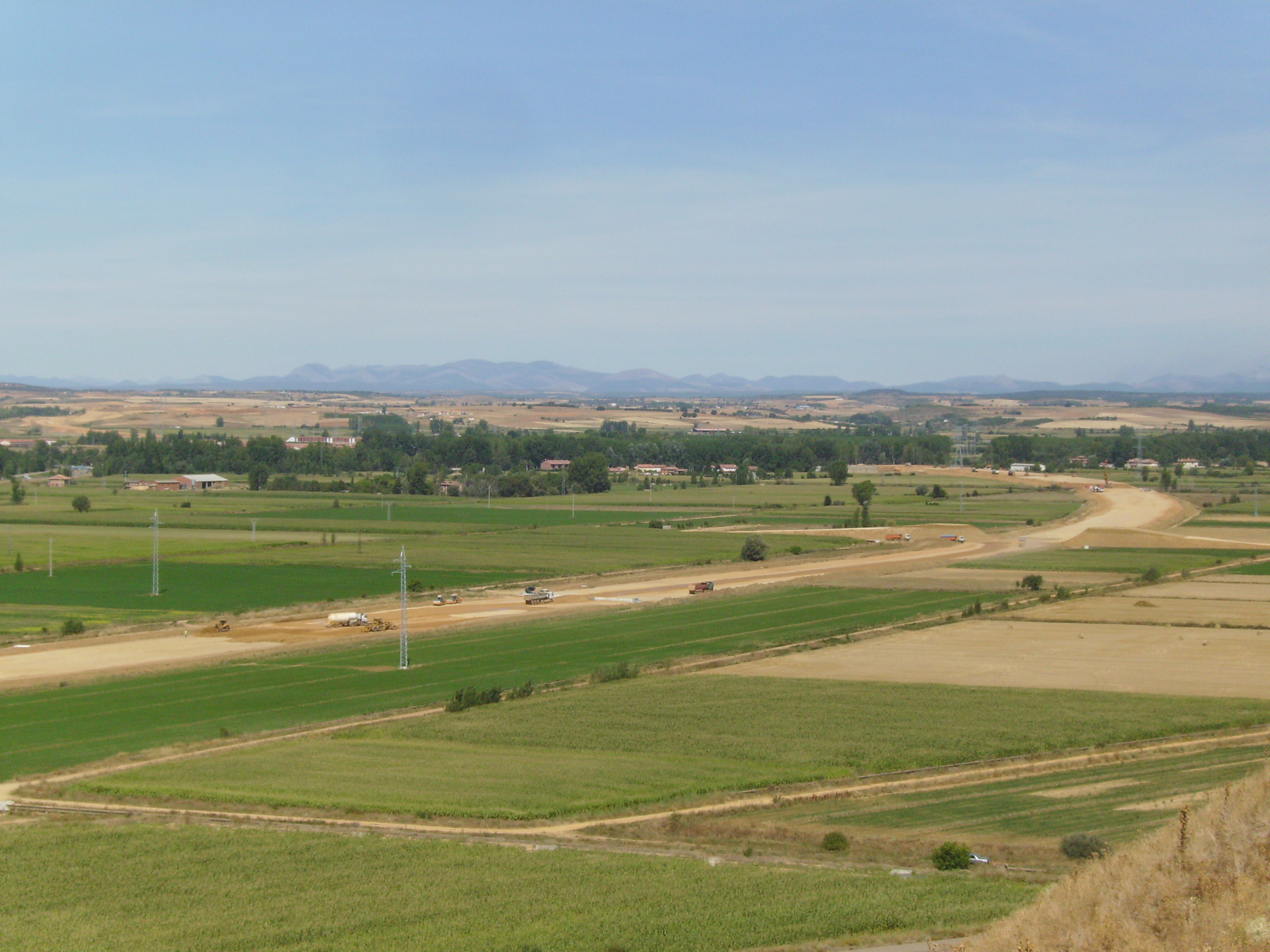 Autovía A-60 en las inmediaciones de la ciudad romana de Lancia.